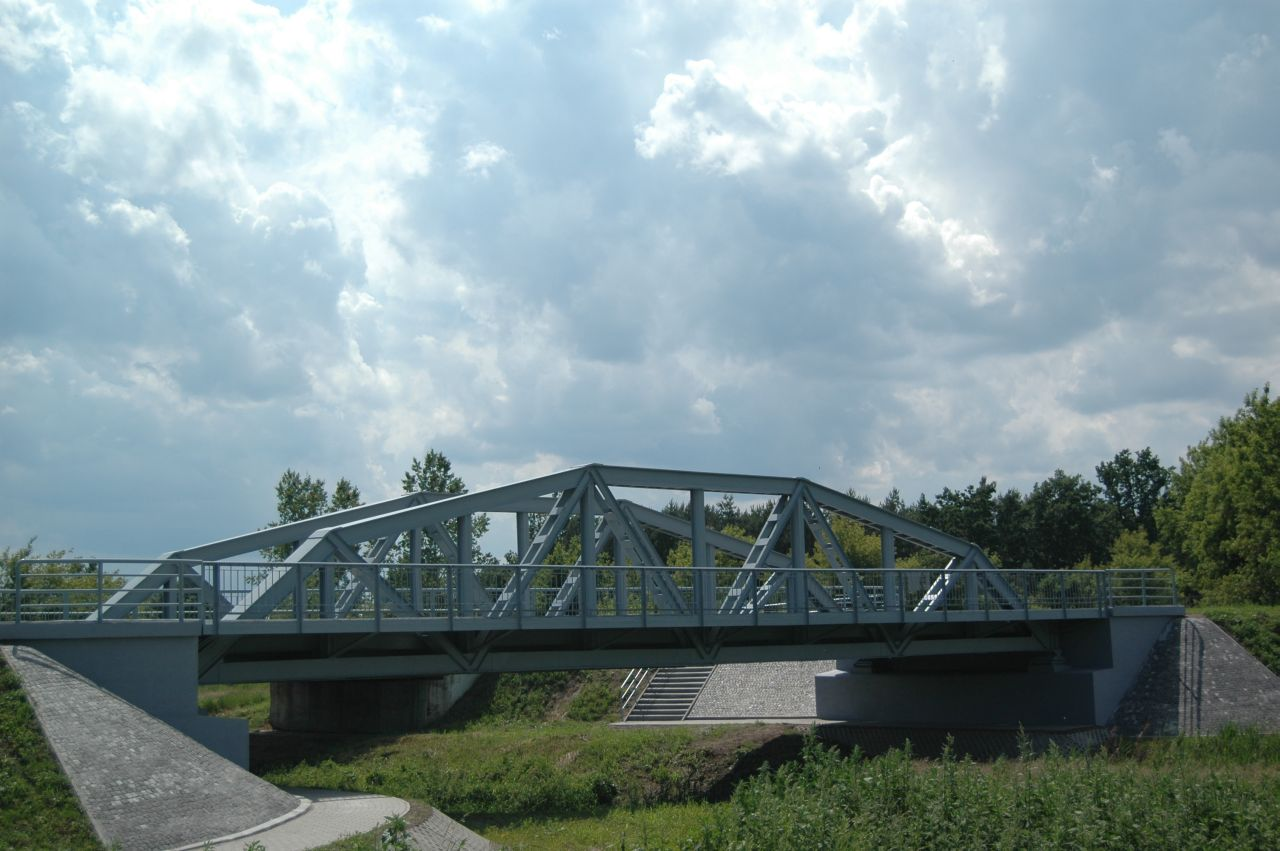 Pierwszy spawany stalowy most na świecie, Polska